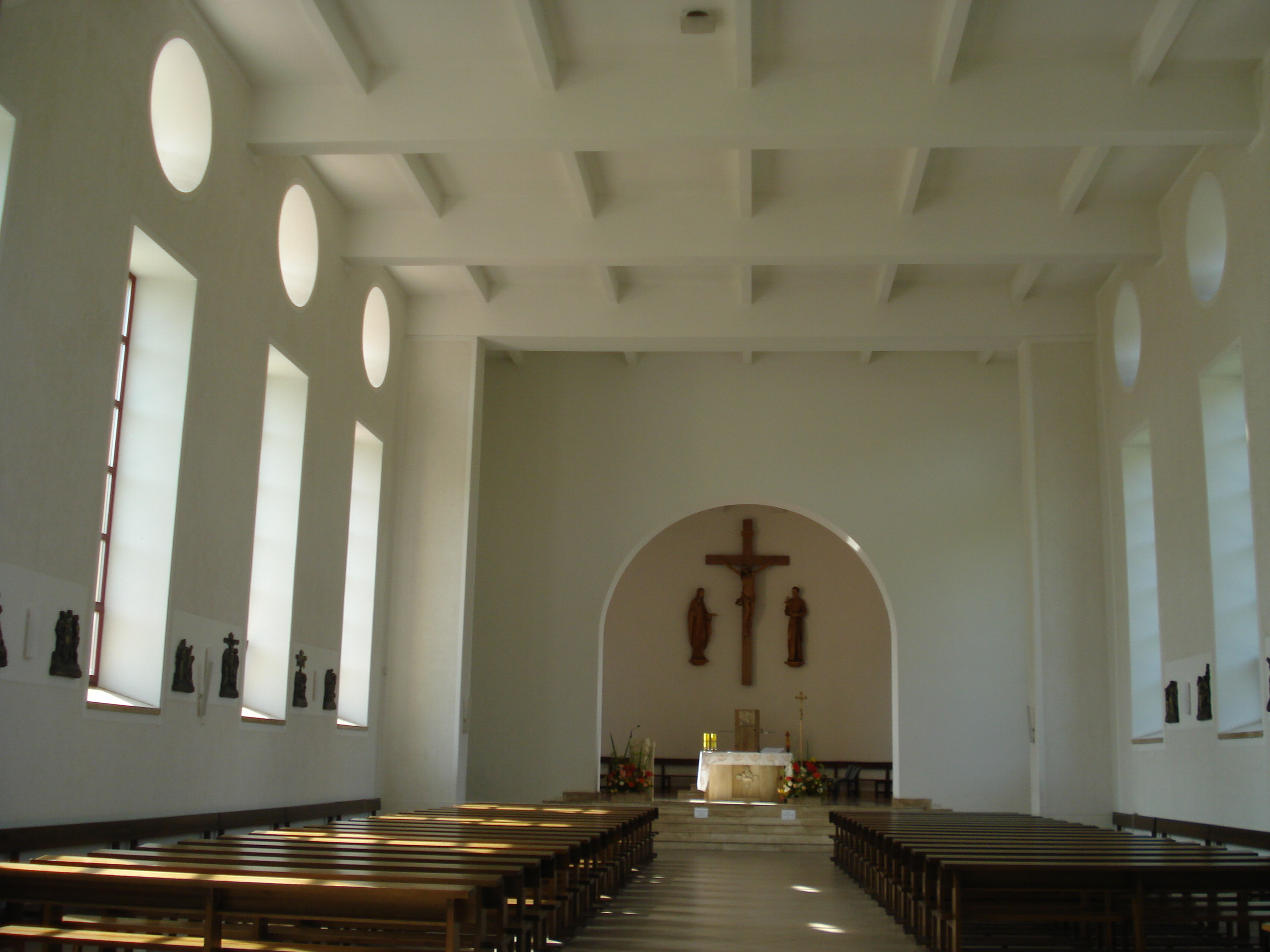 Church of Our Lady Queen of Peace (Vilniaus Švč. M. Marijos, Taikos Karalienės bažnyčia) in Naujoji Vilnia (Parko g. 15)